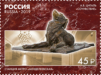 Почтовая марка России из серии «Монументальное искусство Московского метрополитена», выпущенная 26 июня 2019 года. На марке изображён памятник «Сочувствие» работы скульптора А. В. Цигаля. Дизайнер — И. Ульяновский. Номер по каталогу — 2491.